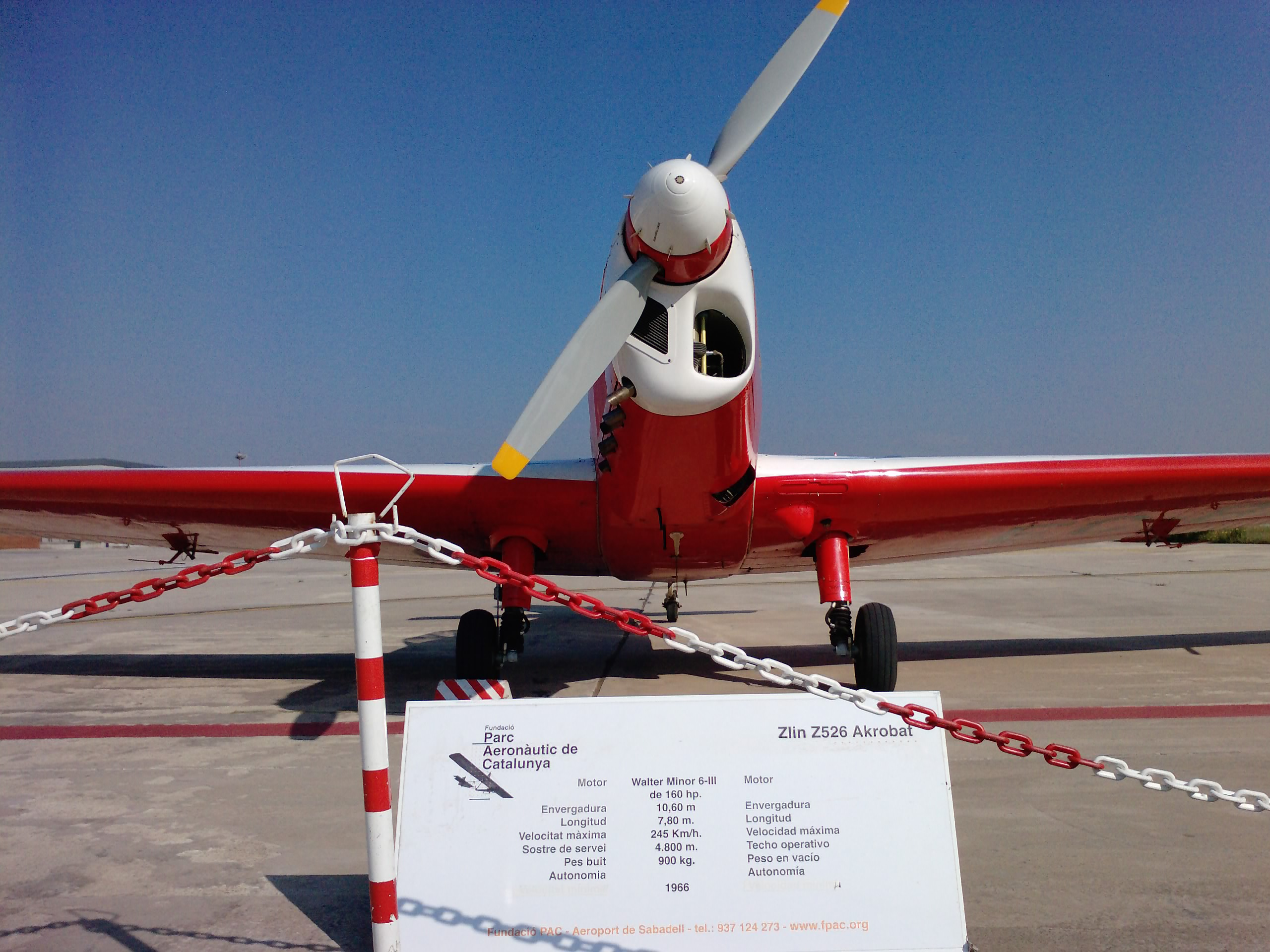 Avión propiedad de la FPAC